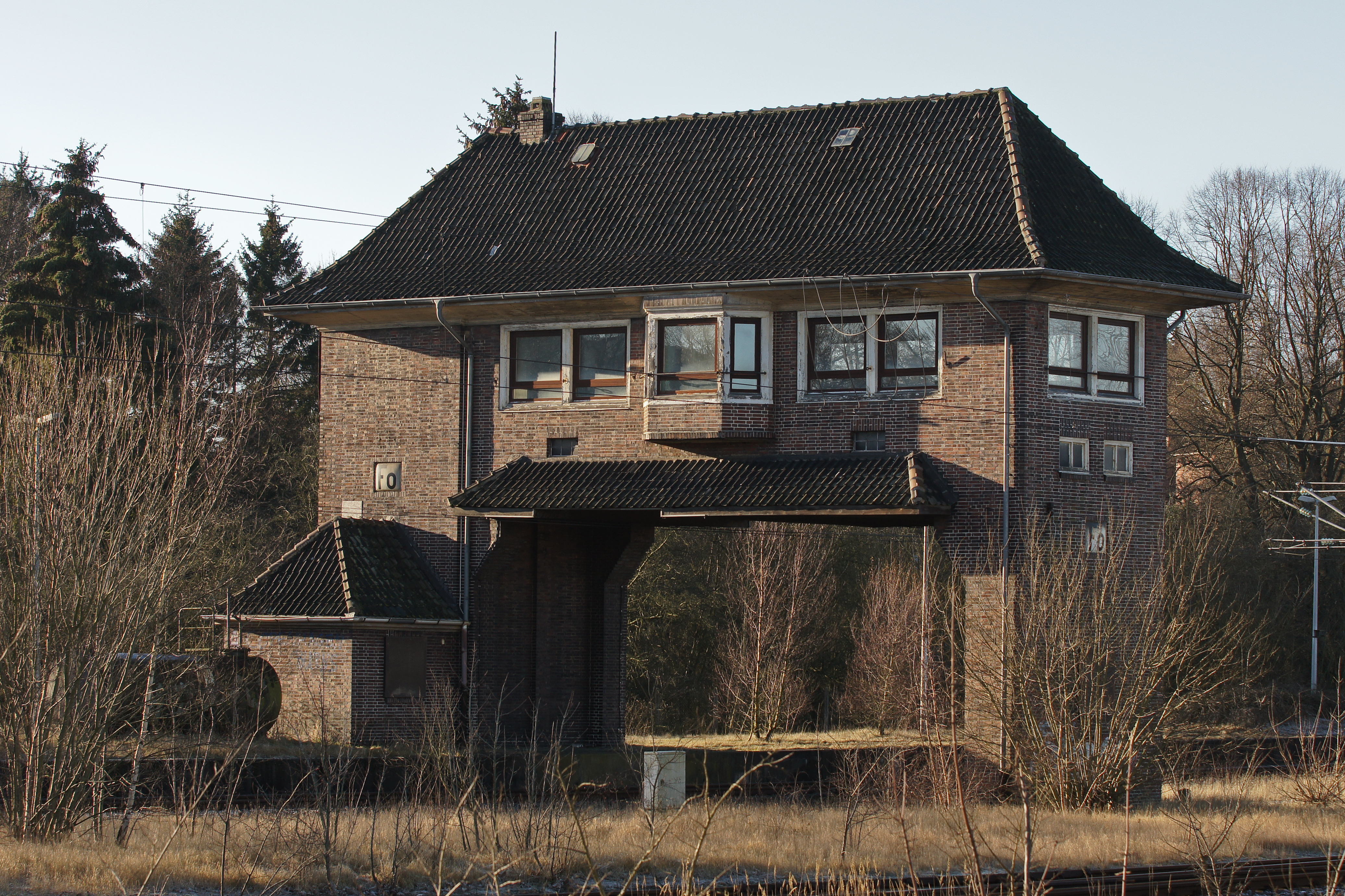 Flensburg-Südstadt, Bahnhof Flensburg, Stellwerk Fo (Brückenstellwerk), Denkmal Nr. 1.5.